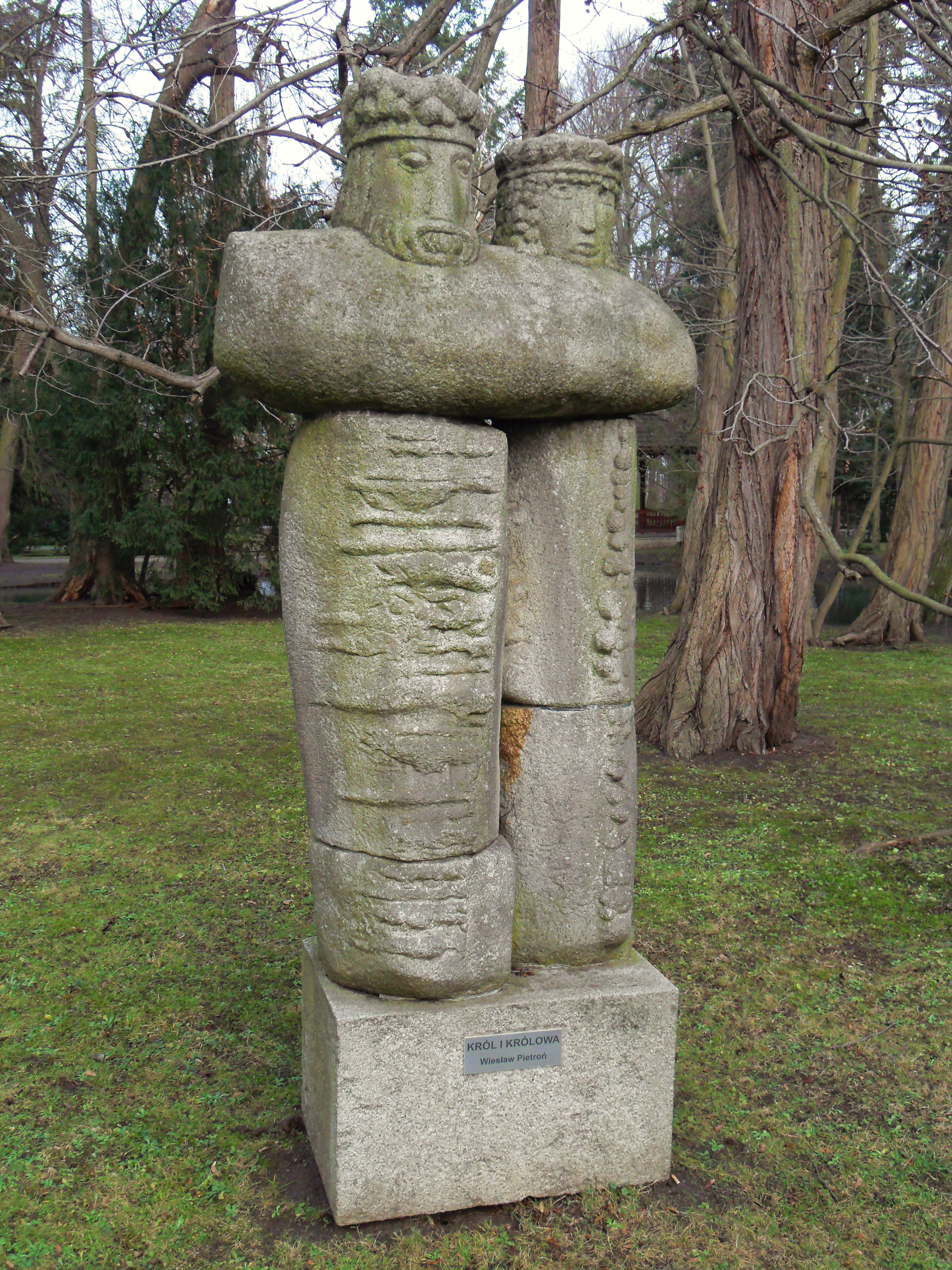 Park Oliwski, rzeźba "Król i królowa", autor Wiesław Pietroń.